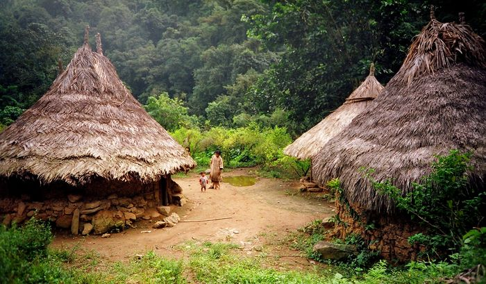 Kogisiedlung/-indianer